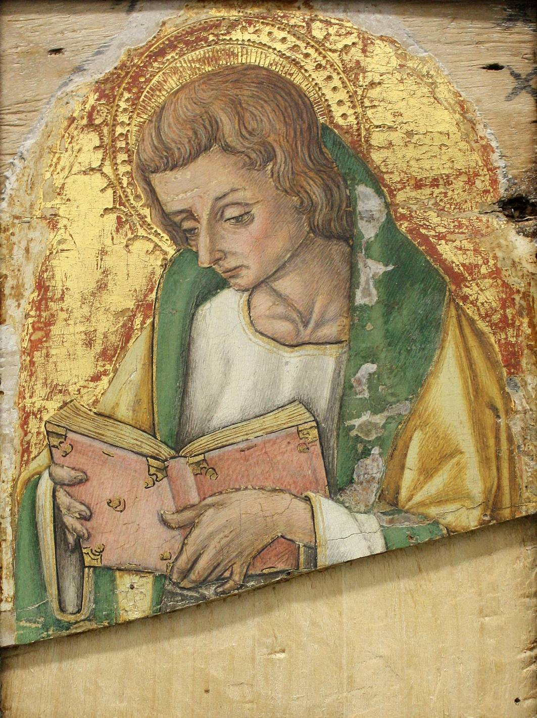 107 Evangelist Johannes (?). Vittore Crivelli (um 1440–1501/1502) (Fragment eines Altarwerks). 24 x 17,2 cm. Tempera auf Holz. Lindenau-Museum Altenburg, Inv. Nr. 107